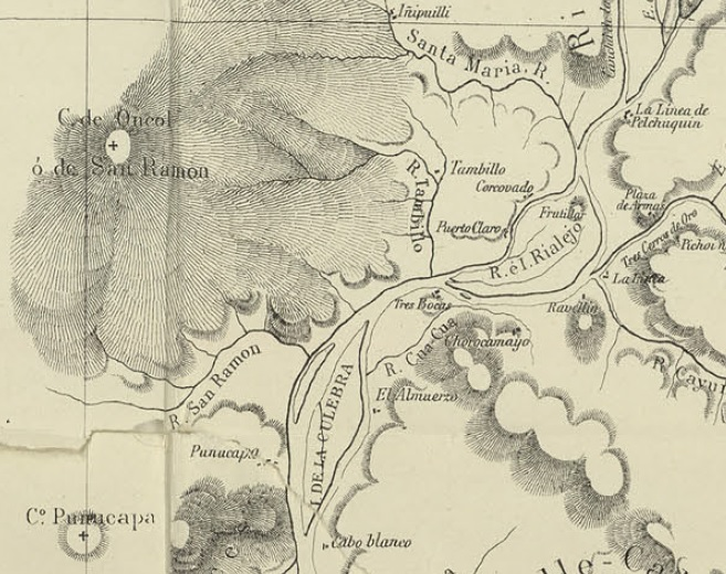 Cerro Oncol a Ravellin en el Mapa de Expedicion de la Francisco Vidal Gormaz 1869